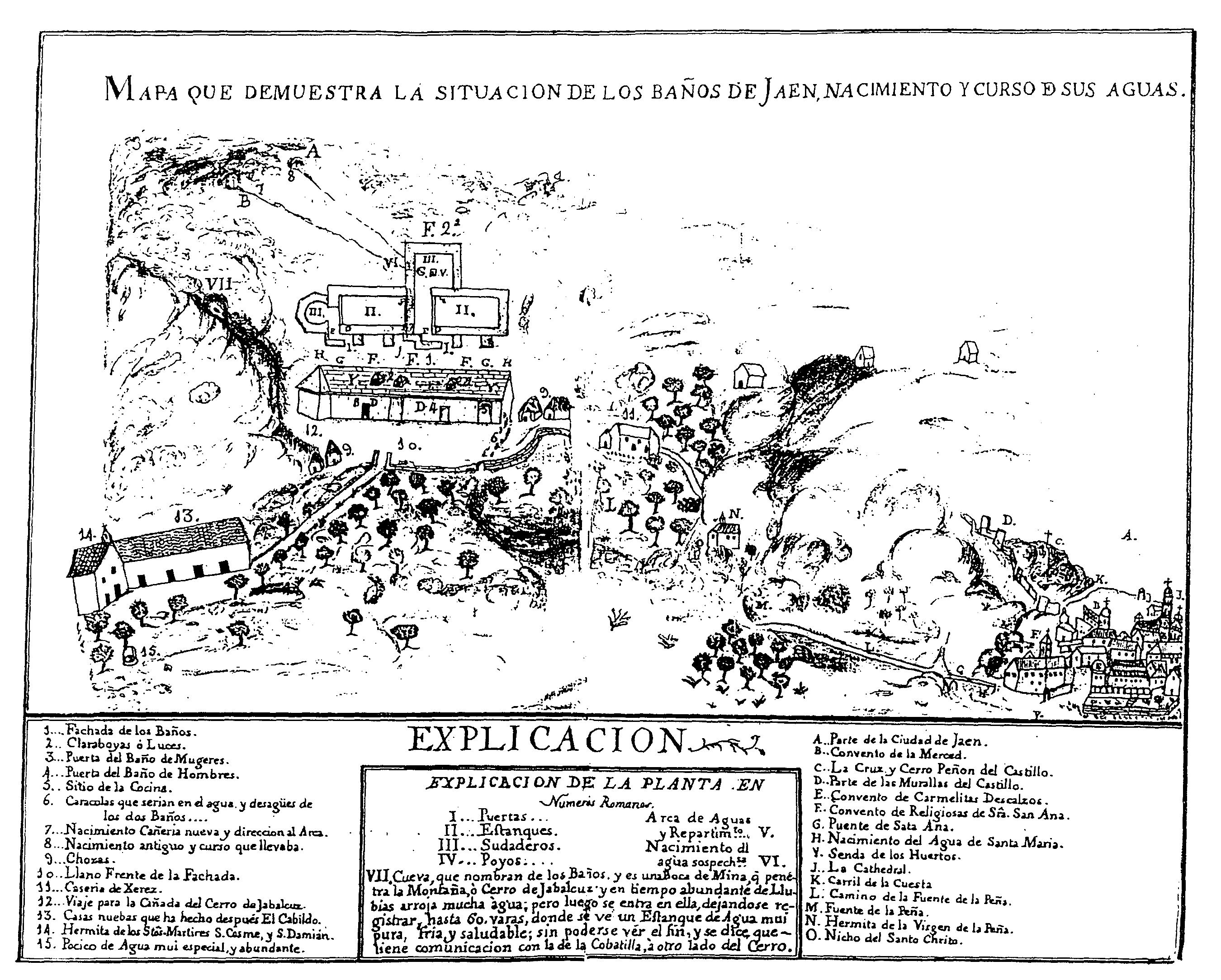 "Mapa que demuestra la situación de los baños de Jaén, nacimiento y curso de sus aguas" (finales del siglo XVIII)